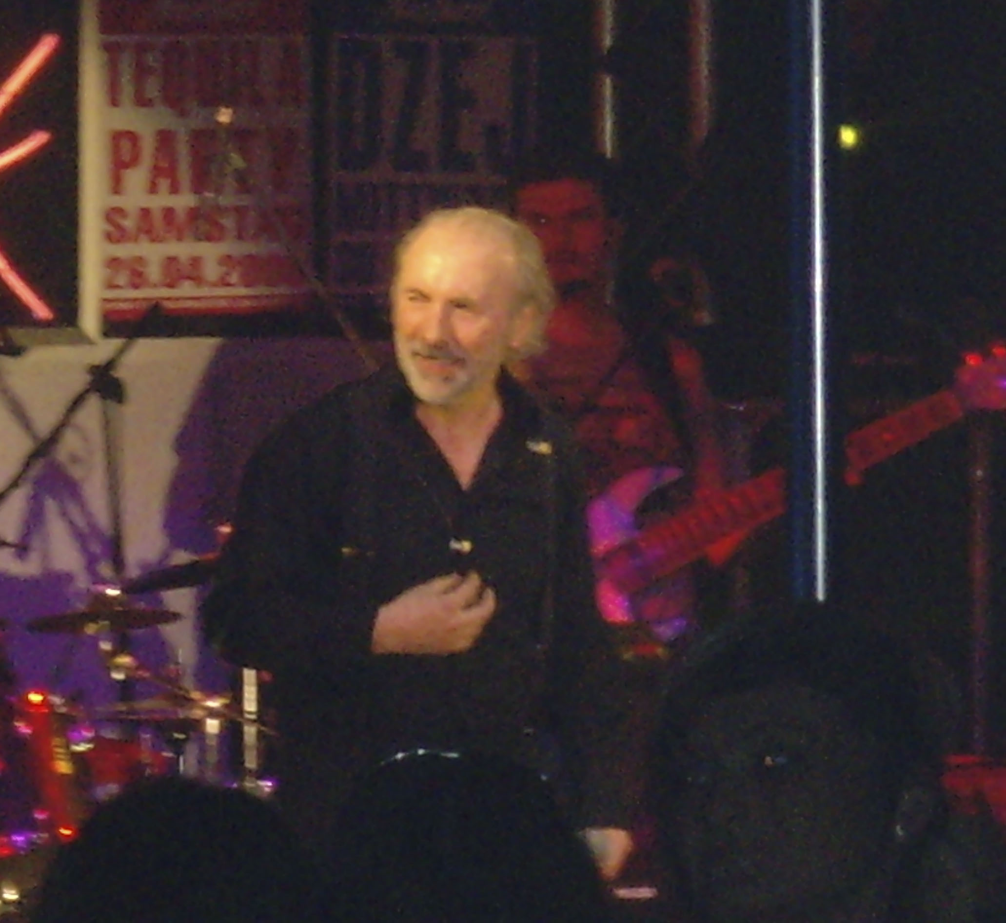 Dino Merlin live in Vienna